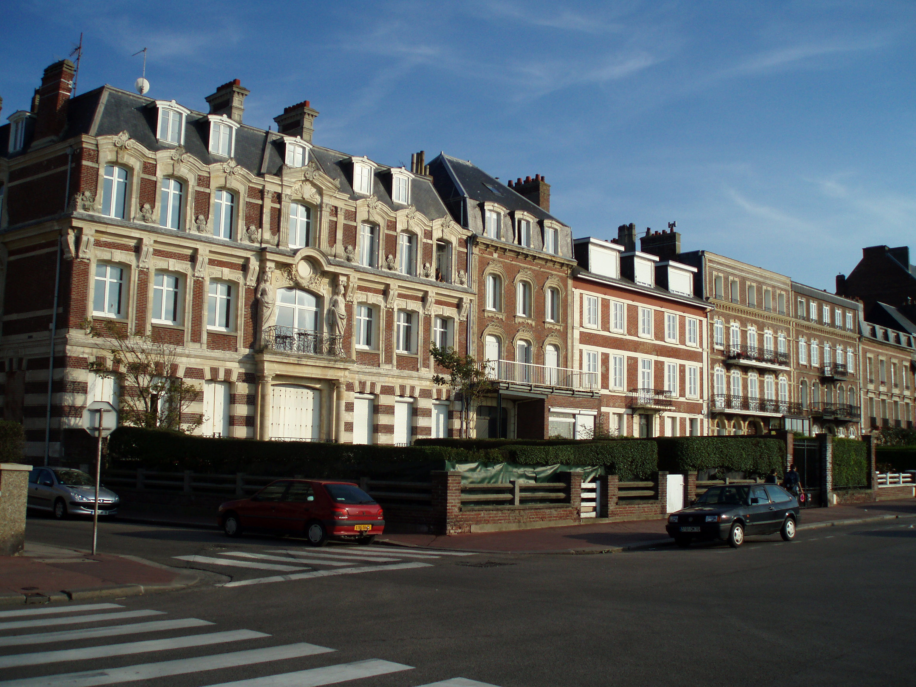 Anciennes maisons (second empire) du Front de mer de Dieppe (France)